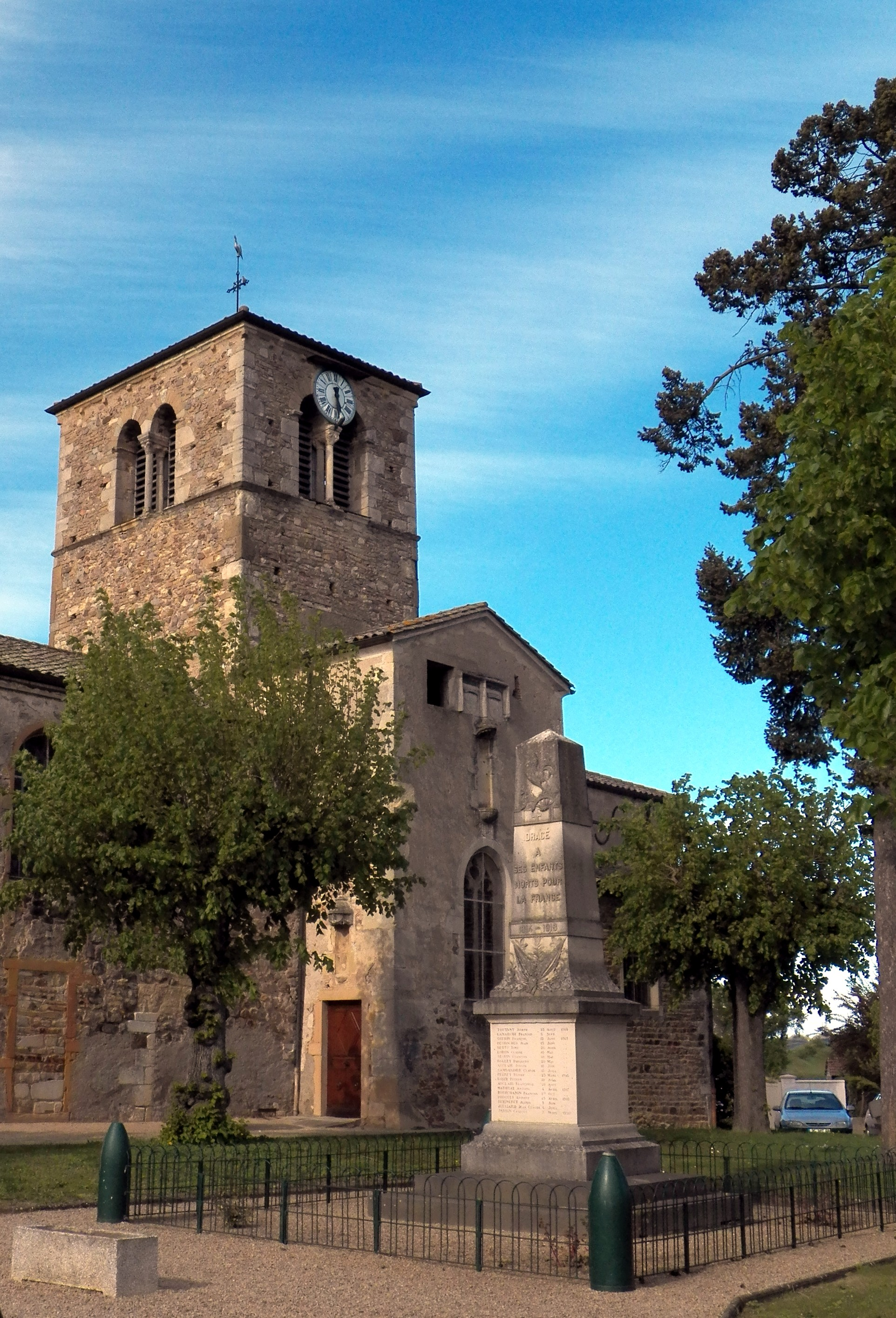 Le monument aux morts et l'église